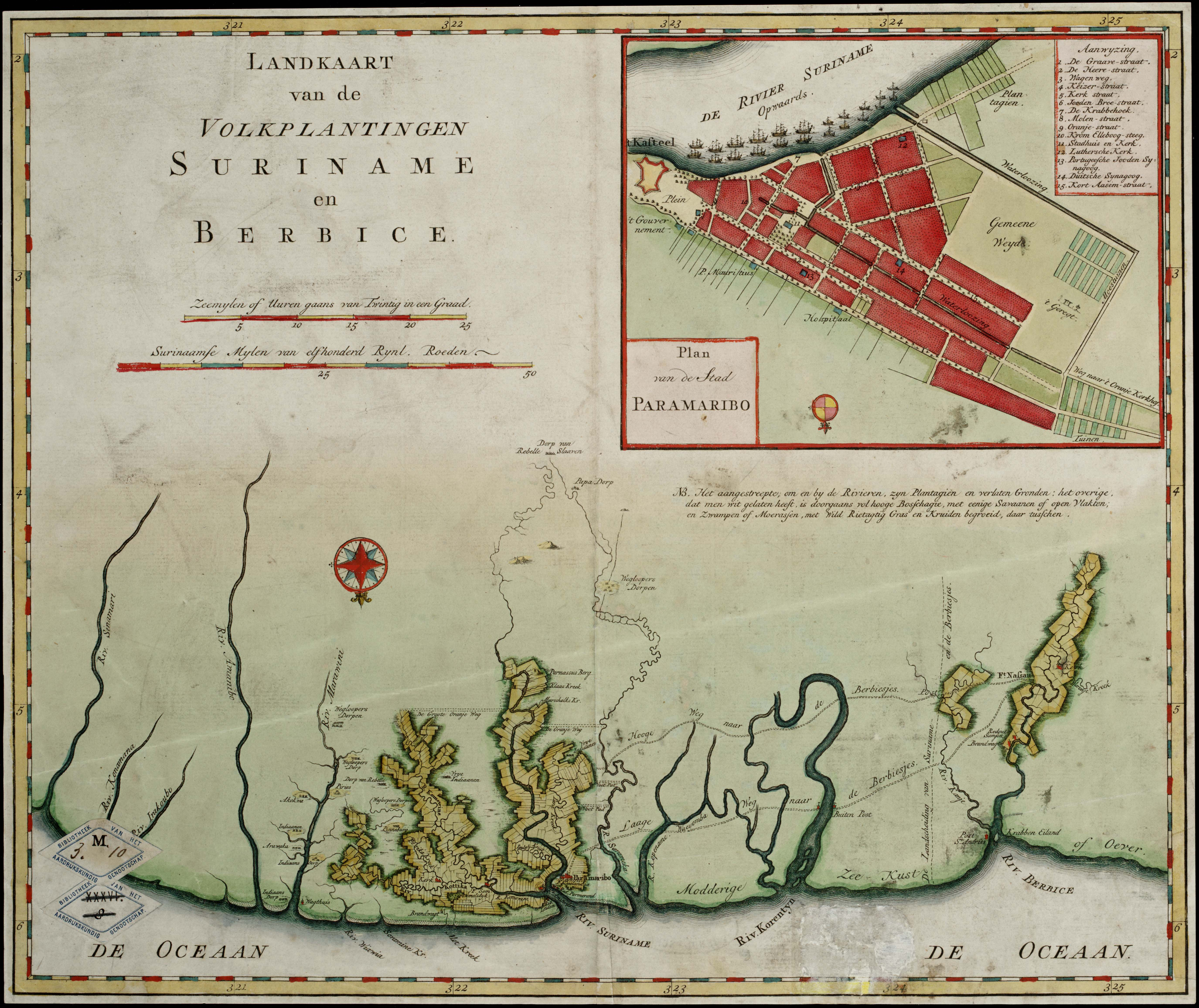 Landkaart van de Volkplantingen Suriname en Berbice